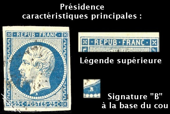 Timbres stamps France Napoleon 1852